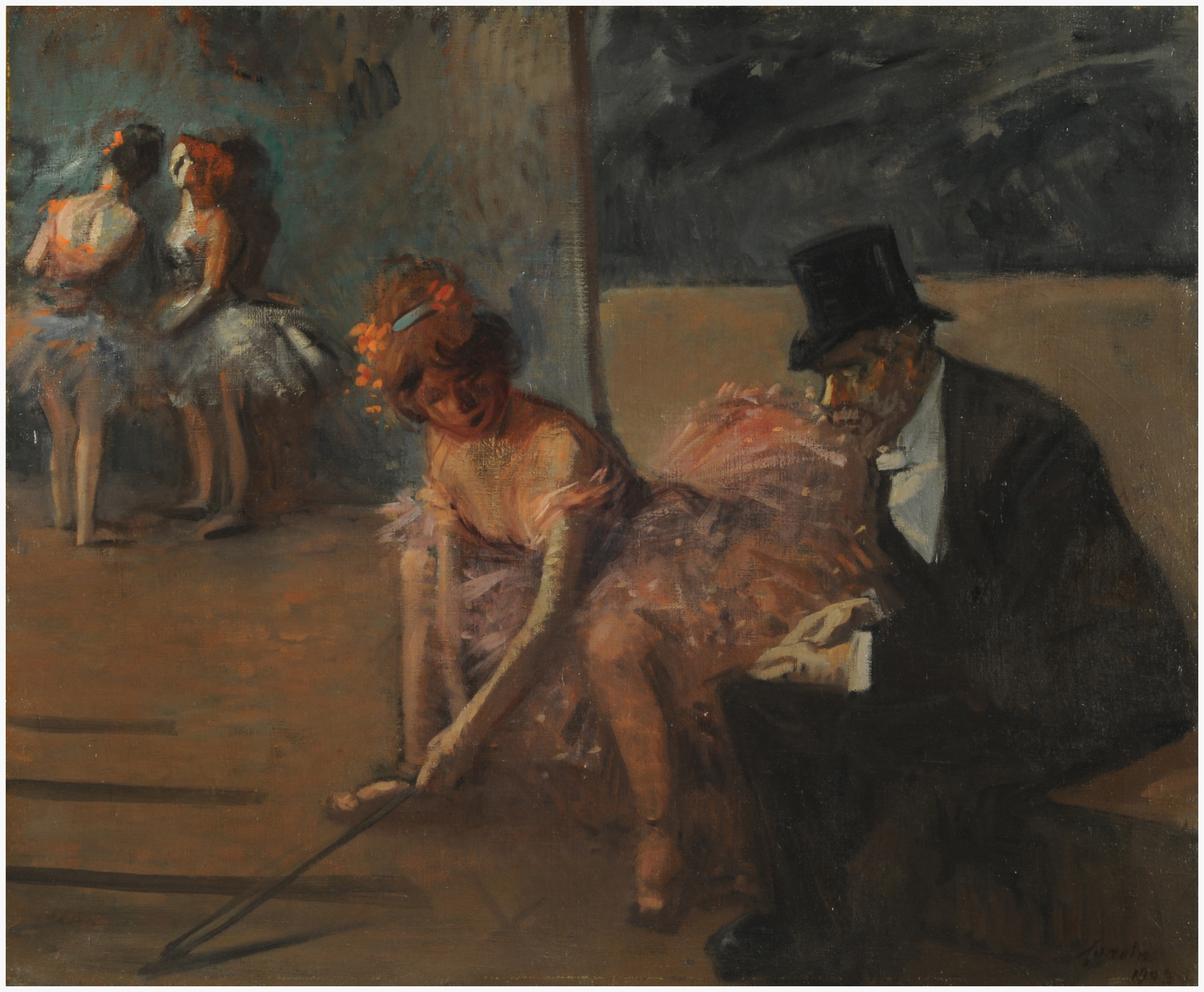 Jean-Louis Forain, Danseuse et admirateur derrière la scène (Bailarina y admirador tras la escena). 1903. 60,5 x 73,5 cm, óleo sobre tela. Inv. 8542.